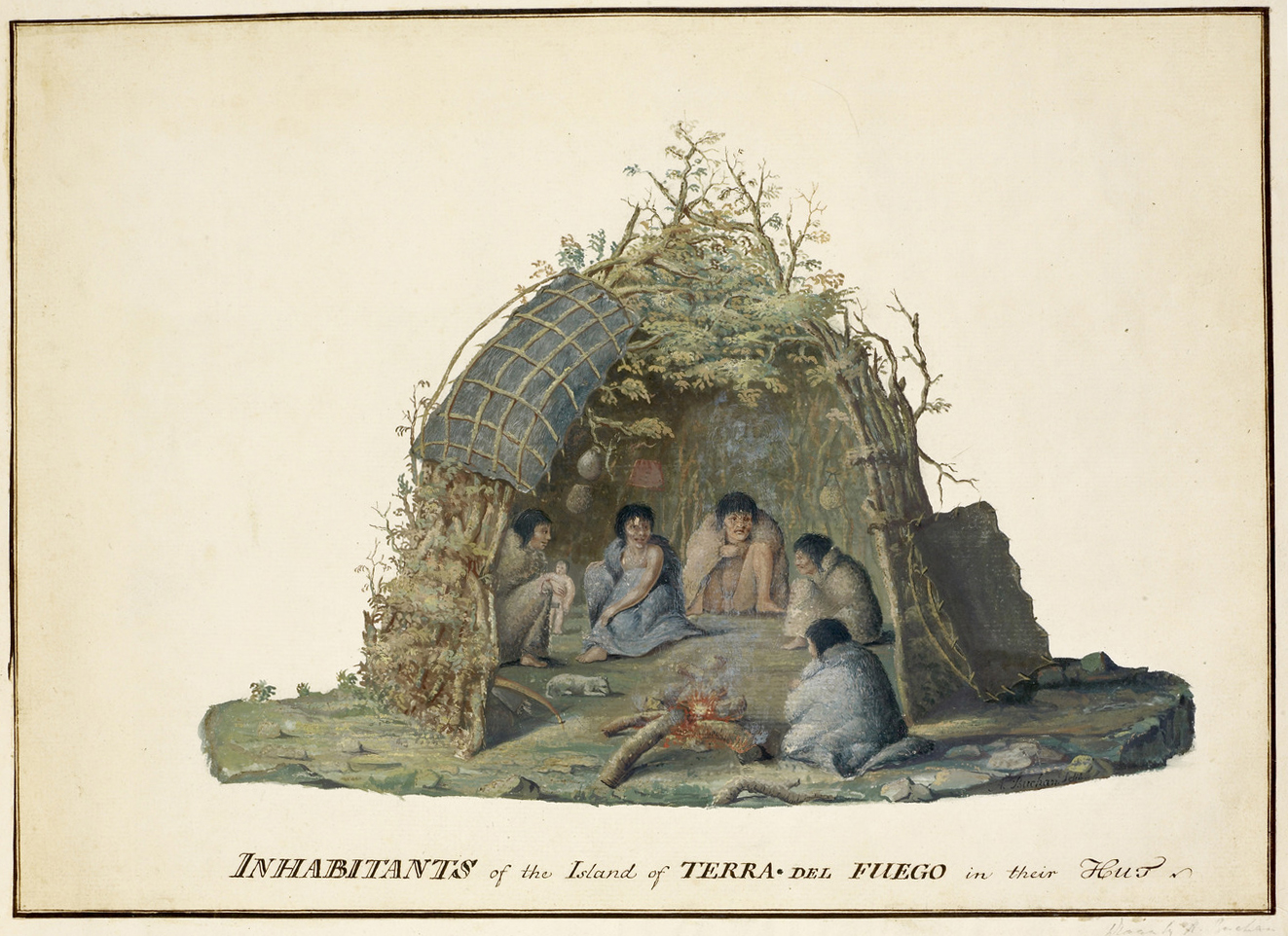 Ilustración realizada al guache por Alexander Buchan en algún momento del mes de enero o febrero de 1769. En ella se representa a un grupo de nativos haush de Tierra del Fuego con sus vestimentas y utensilios dentro de una de sus cabañas tal y como los habían observado durante la visita que Joseph Banks y su grupo realizaron a una aldea de nativos fueguinos durante la escala que el navío británico HMB Endeavour capitaneado por James Cook hizo en la Bahía Buen Suceso a mediados de enero de 1769. El título en la base de la ilustración es de Herman Dietrich Spöring, asistente de Banks.